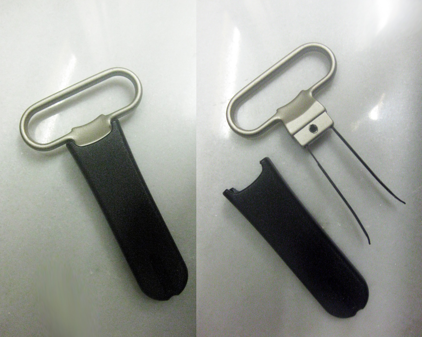 Mit einem Federzungen-Korkenzieher kann man auch Korken in Flaschen einsetzen.